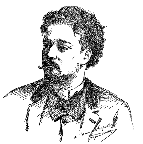 Portrait de Félix Charpentier, sculpteur